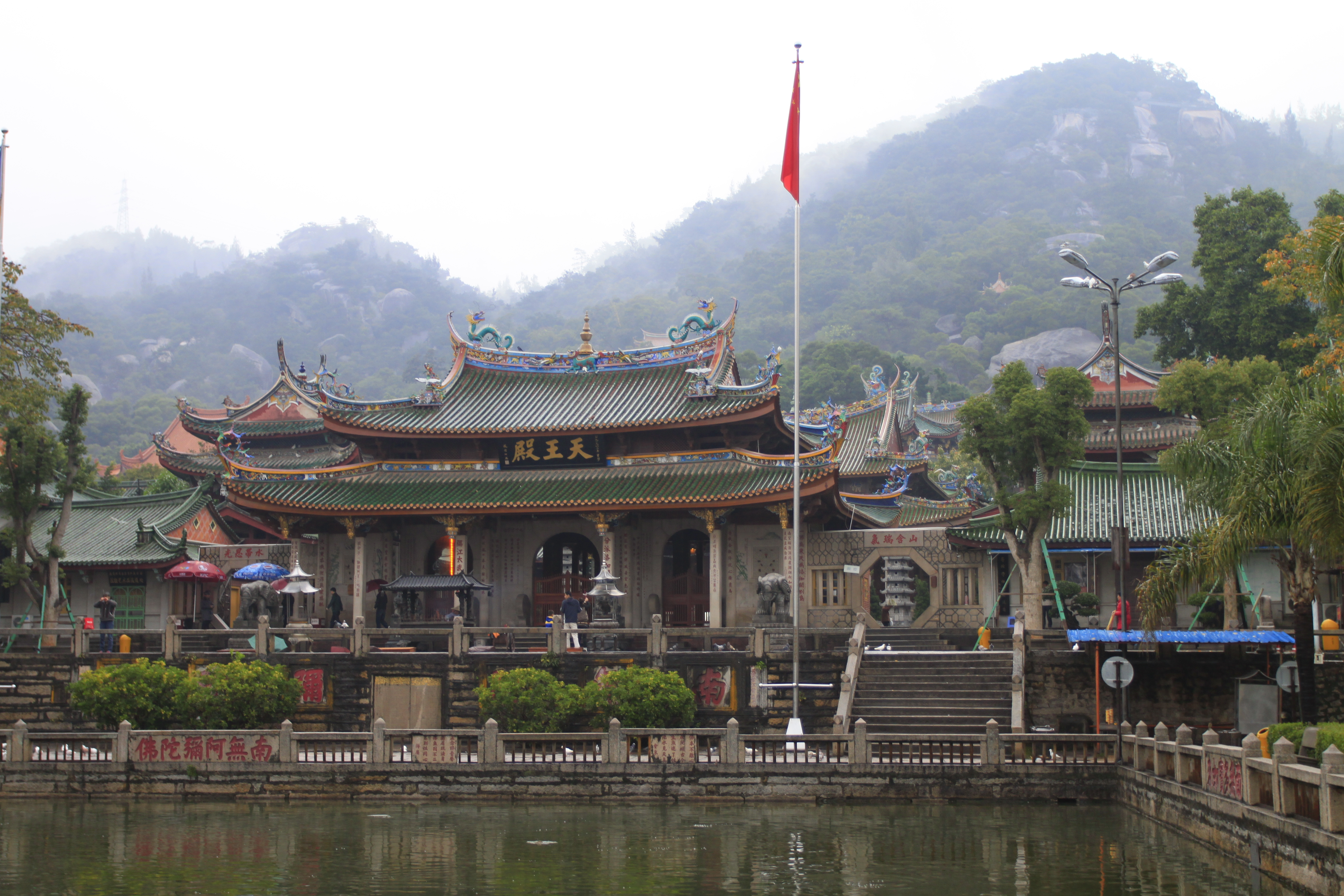 南普陀寺，位于中国福建省厦门市。